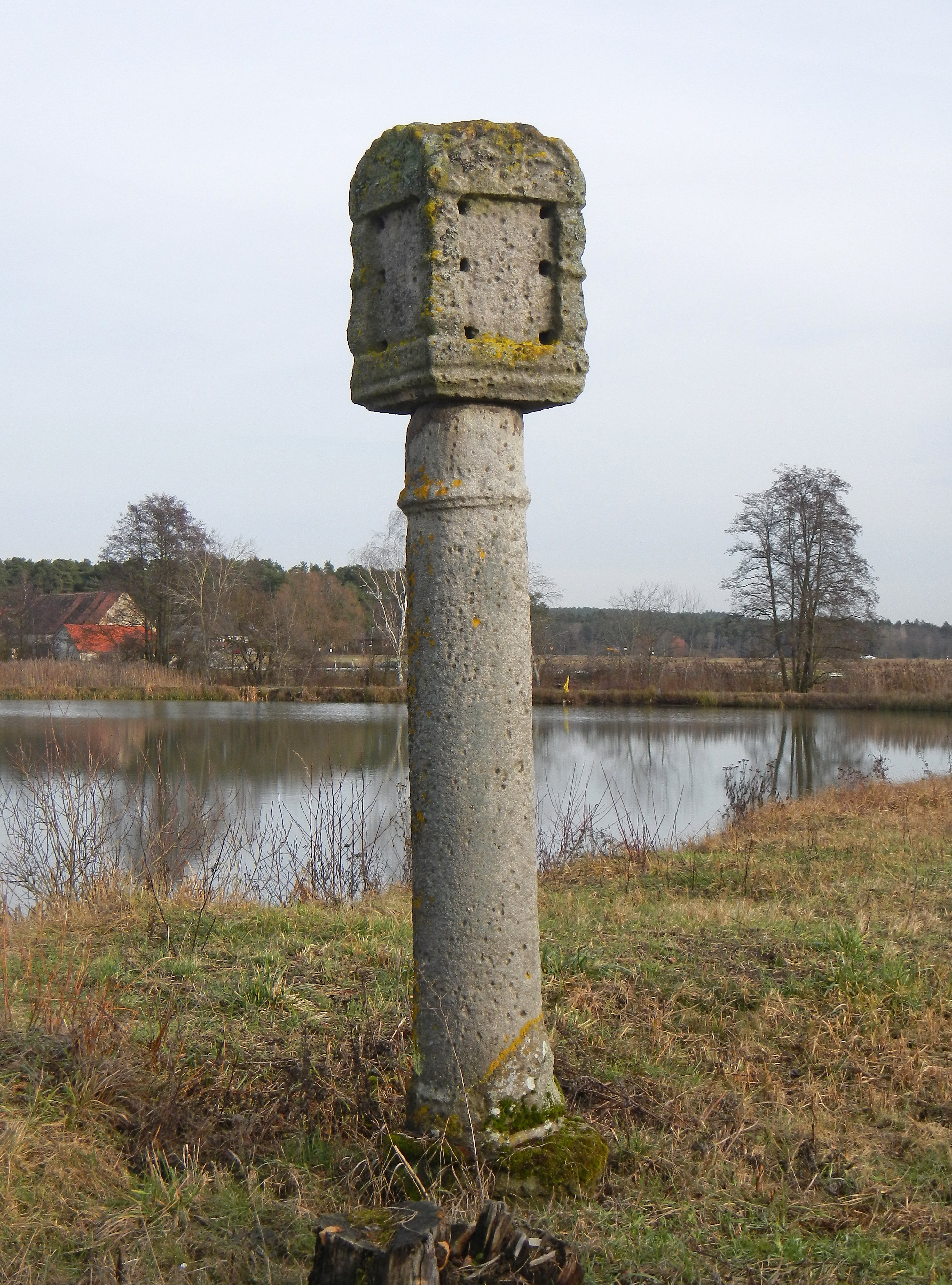 Bildstock, Ende 17. Jahrhundert an der Straße zwischen Hannberg und Röhrach (Gemeinde Heßdorf) im Landkreis Erlangen-Höchstadt.